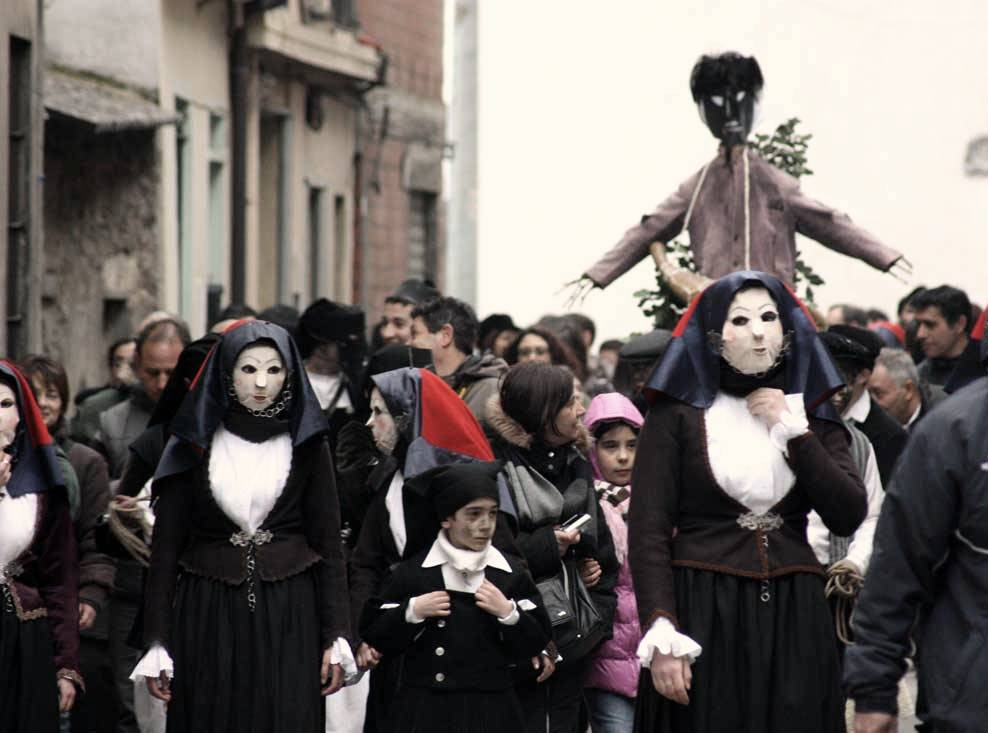 Scene del corteggio de su Maimulu a Ulassai, si intravede il fantoccio Martisberri, con alcune maschere femminili